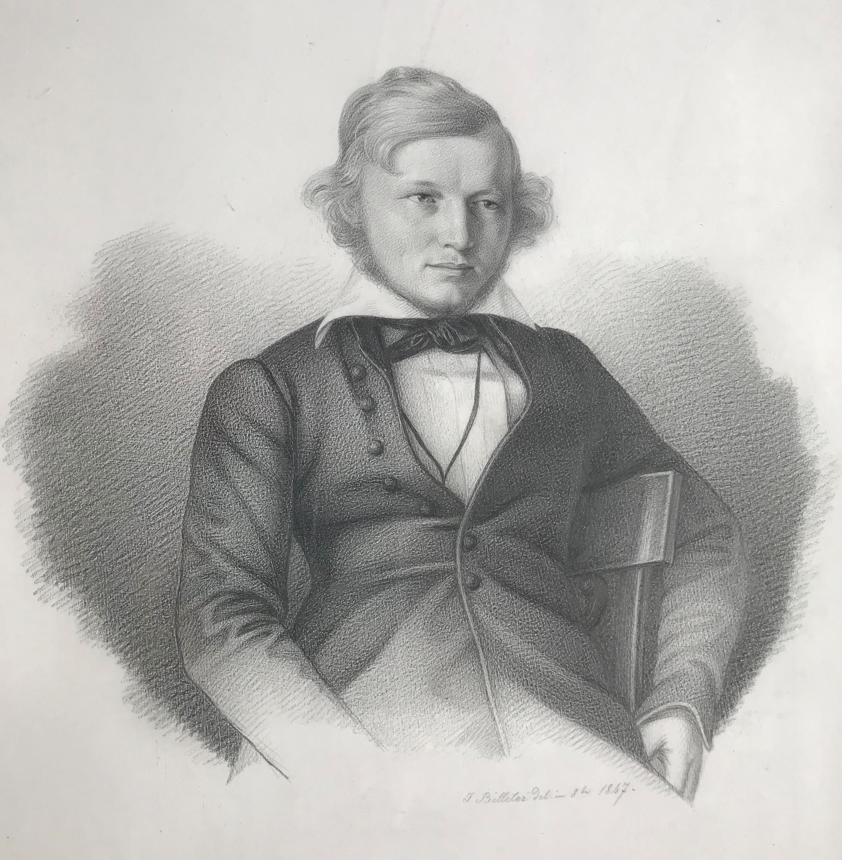 Porträt von 1847 des schweizerischen Sprachwissenschafters Dr. Friedrich Staub (1826–1896), Gründer und Chefredaktor des Schweizerischen Idiotikons sowie (Leitender) Bibliothekar an der Stadtbibliothek Zürich